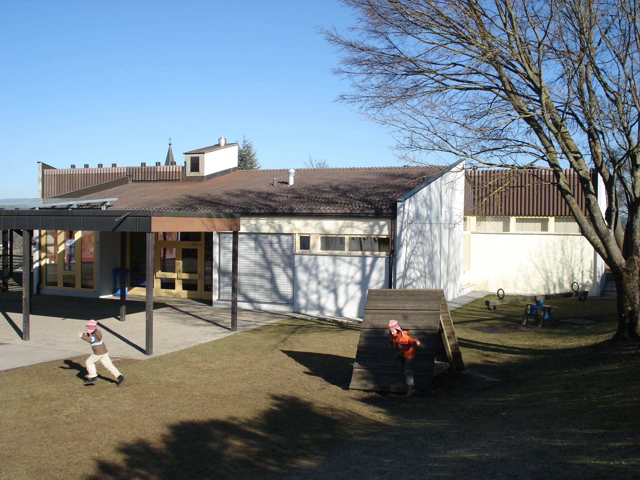 Ecole primaire d'Avry